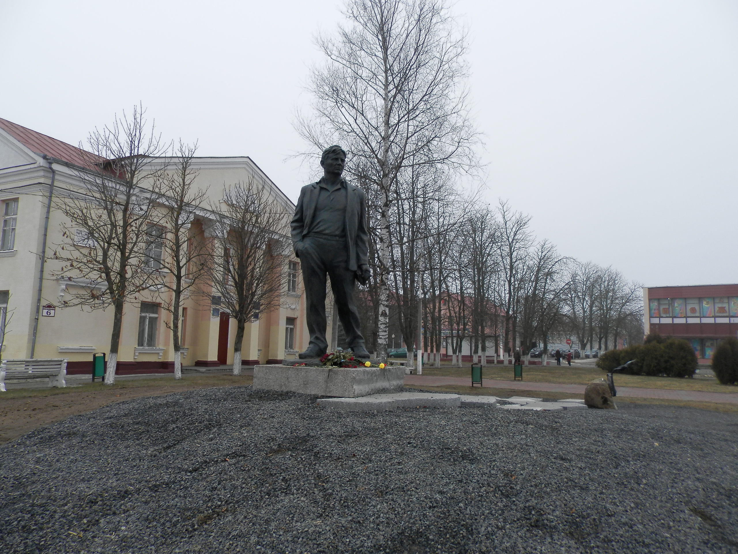 Памятник Максиму Танку в г. Мядель. Открыт 5 декабря 2014 года